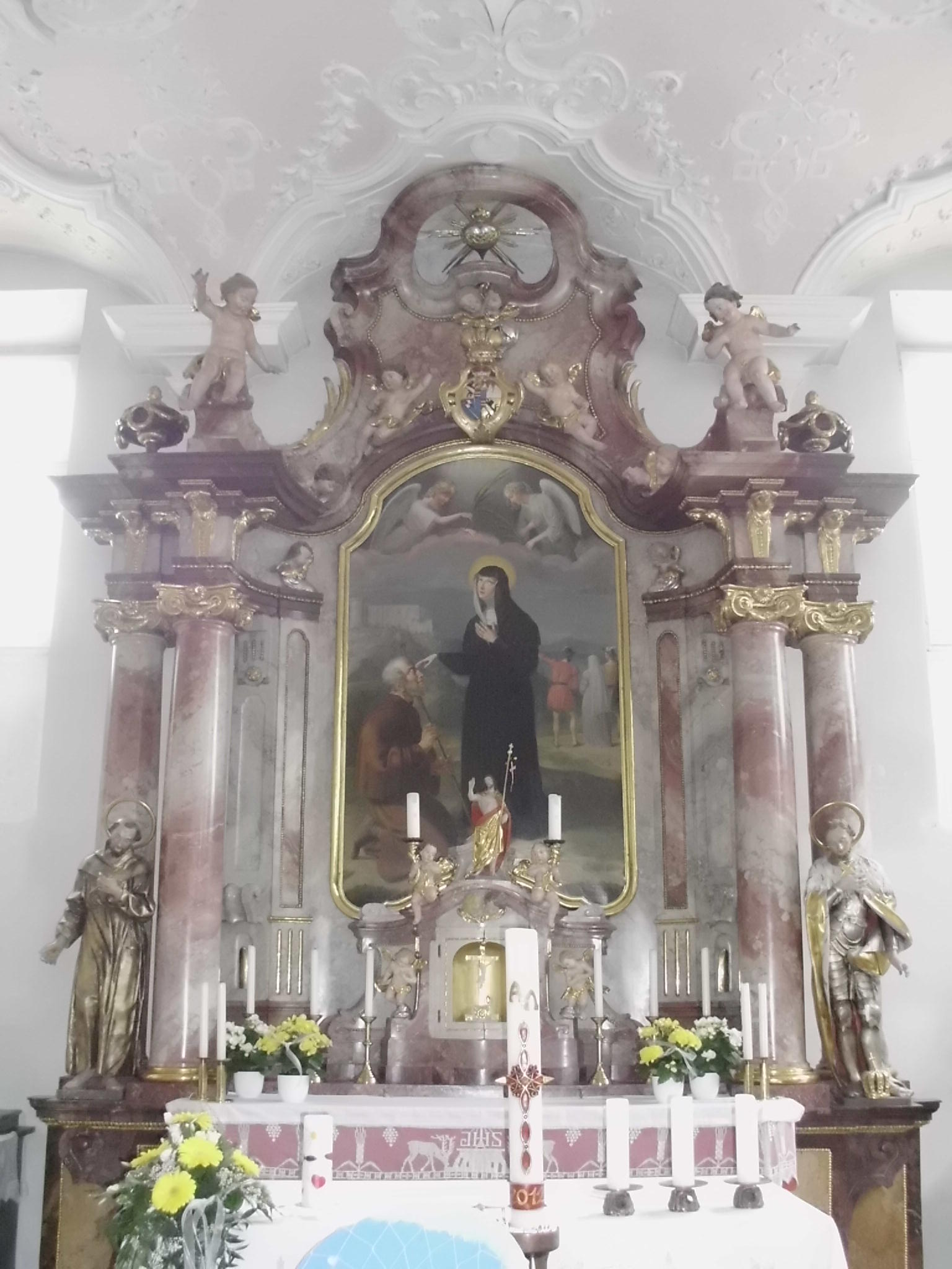 Absberg, Landkreis Weißenburg-Gunzenhausen (Bayern), Ehemaliges Deutschordensschloss, Schlosskapelle (heute Kath. Pfarrkirche St. Ottilia), Hauptaltar (aus der Karlshalle Ansbach stammend)